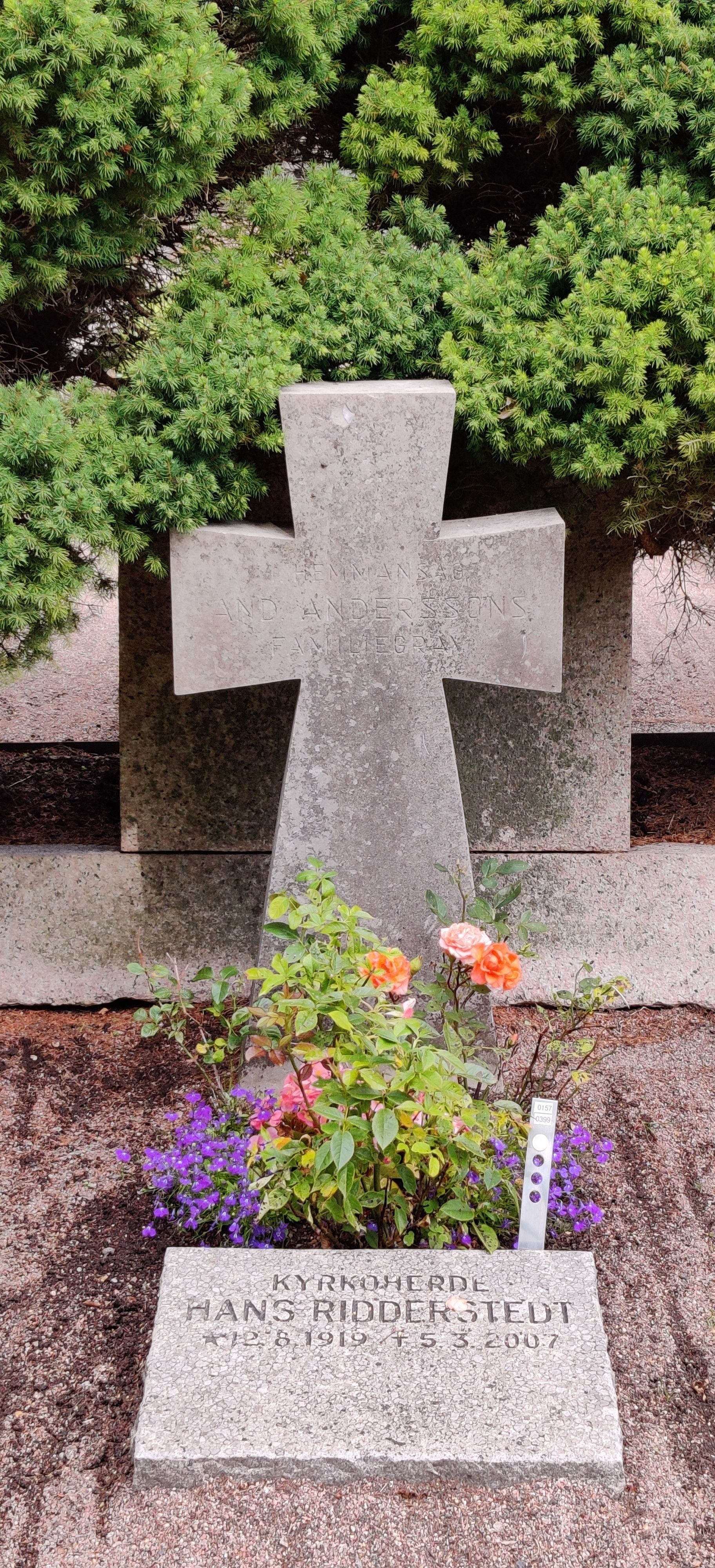 Grav Uppsala Gamla kyrkogård